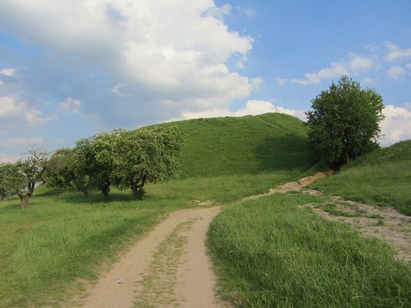 Ваўкавыск. Шведская гара